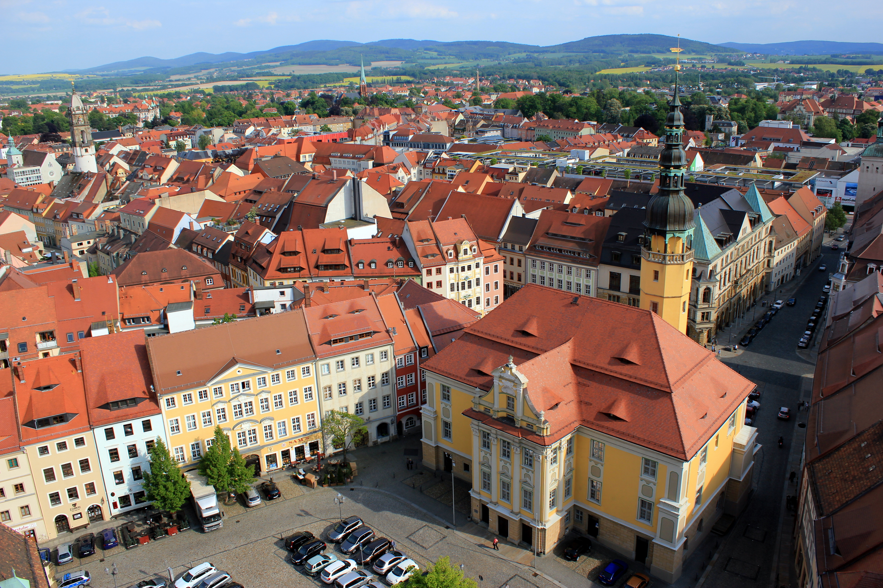 Hornjoserbsce: Budyska radnica z wěže Tachantskeje cyrkwje.